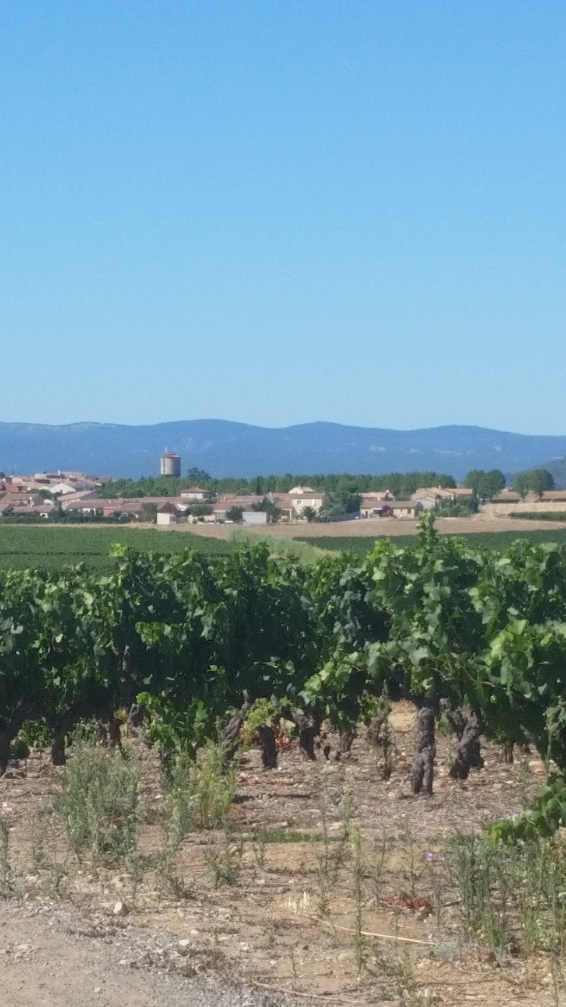 Sainte-Valière vue des vignes par la route de Ventenac